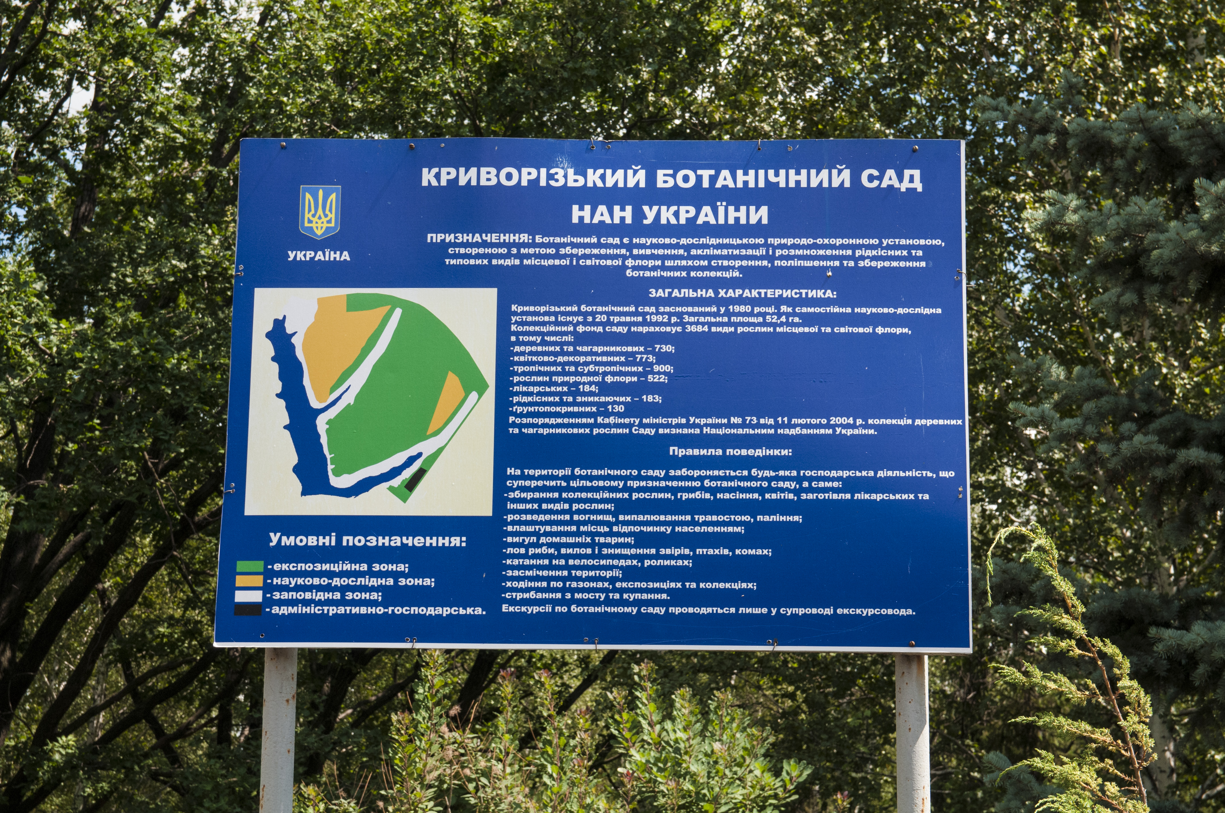 Криворожский ботанический сад. Информационный щит.